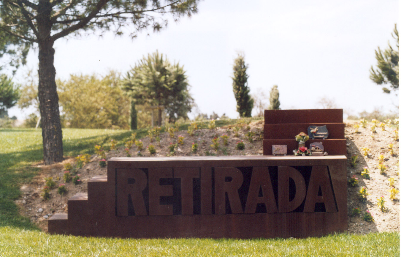 Bram